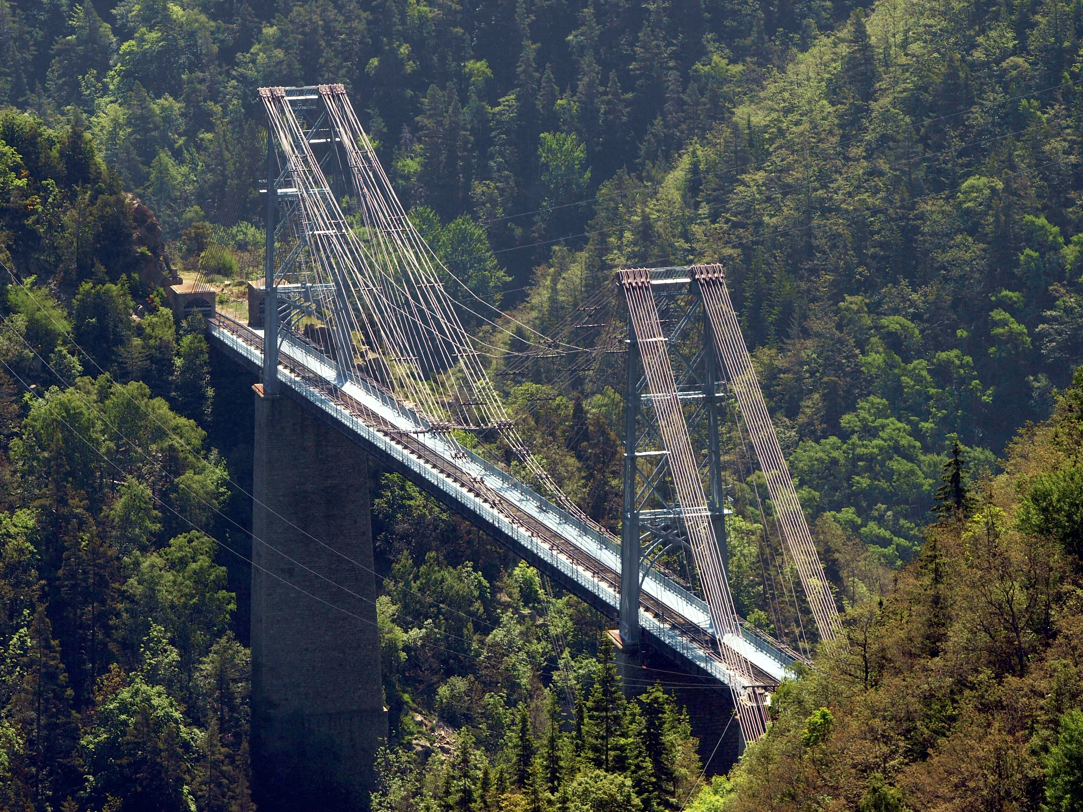 Pont suspendu dit pont Gisclard dans les PO France 2005. Cevenol2